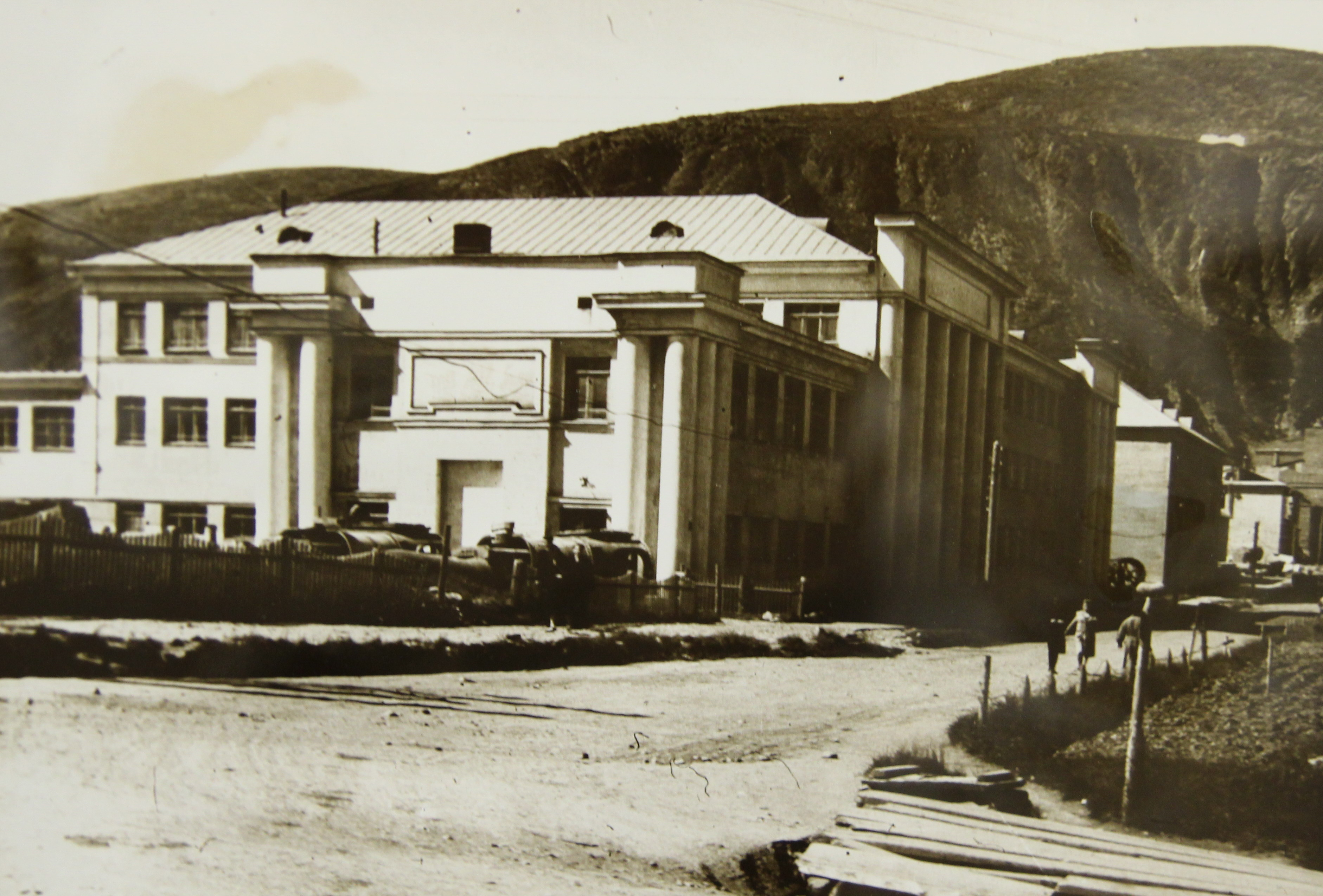 Горнохимический техникум 1937. Кировск